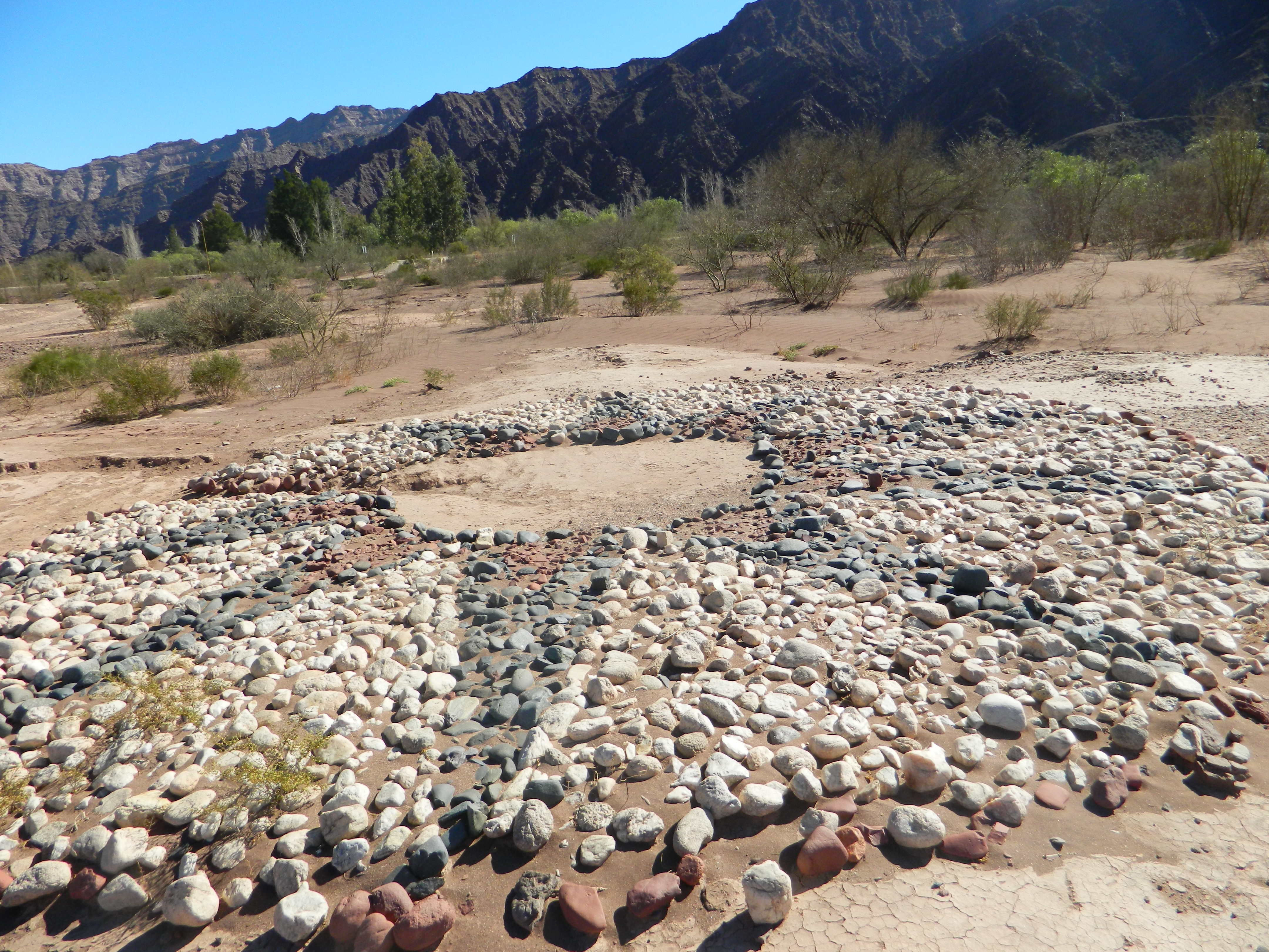 Las estrellas Capayanes Las estrellas Capayanes están ubicadas a 2 Km del pueblo de Vinchina, a orillas de Rio Bermejo al costado izquierdo del camino que conduce a la localidad de Jague. Según el historiador Nicolás de la Fuente, es un geoglifo (dibujo sobre la tierra) en forma de estrella de nueve puntas, realizada en canto rodado, en piedra color rojo, blanca y negra, Actualmente se encuentran tres estrellas, de las seis originarias, dos de ellas fueron reconstruidas hace unos años. Se desconoce su utilidad, se cree fueron utilizadas para rituales religiosos.